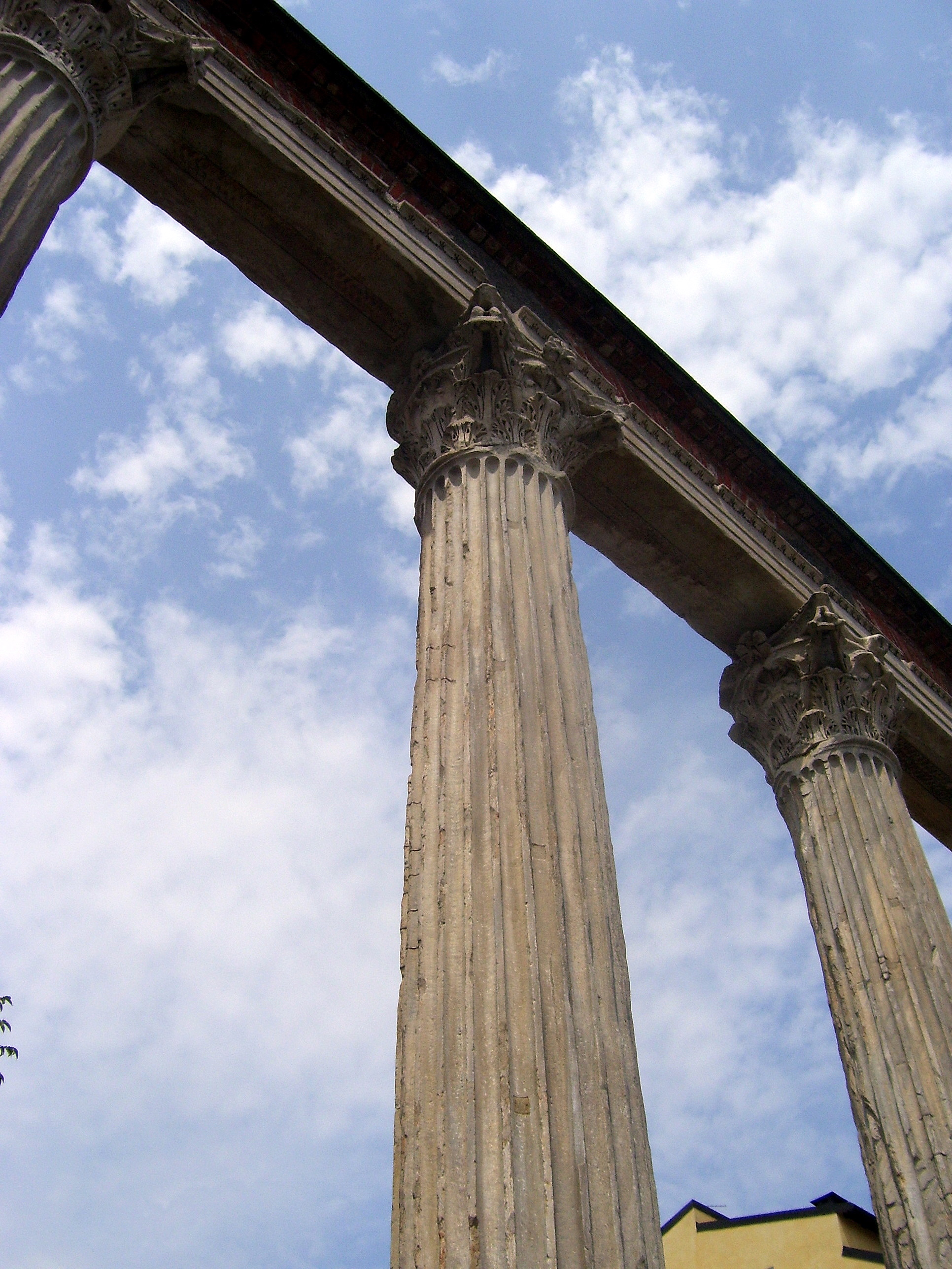 Colonne di San Lorenzo in Milan